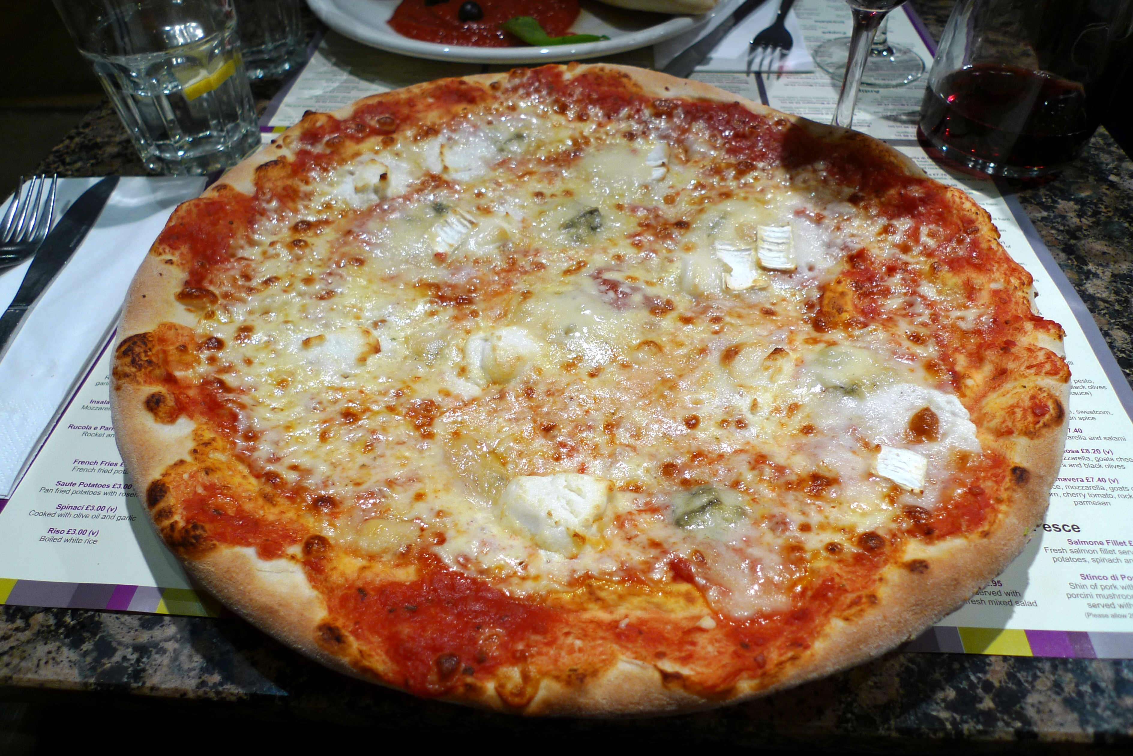 The "pizza ai quattro formaggi" at La Porchetta, Chalk Farm Road.